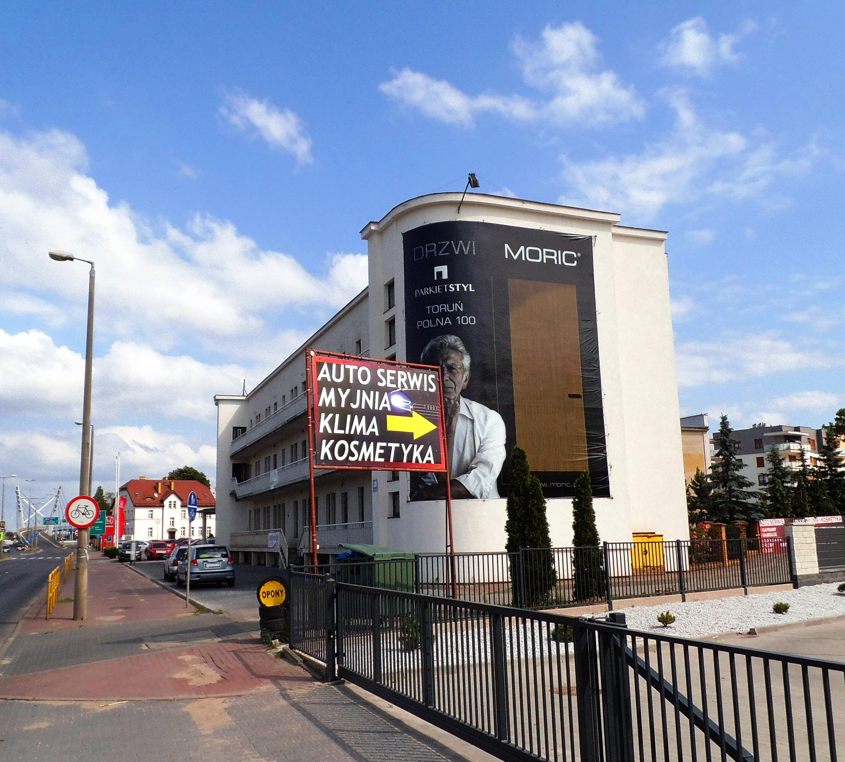 Dawna Chłodnia Składowa w Toruniu